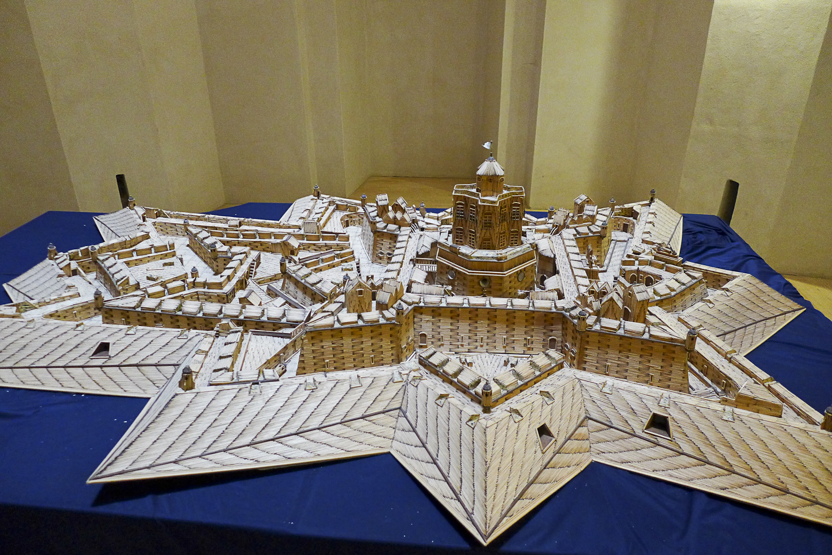 Portugal-Elvas-Forte de Nossa Senhora da GraçaP1170672